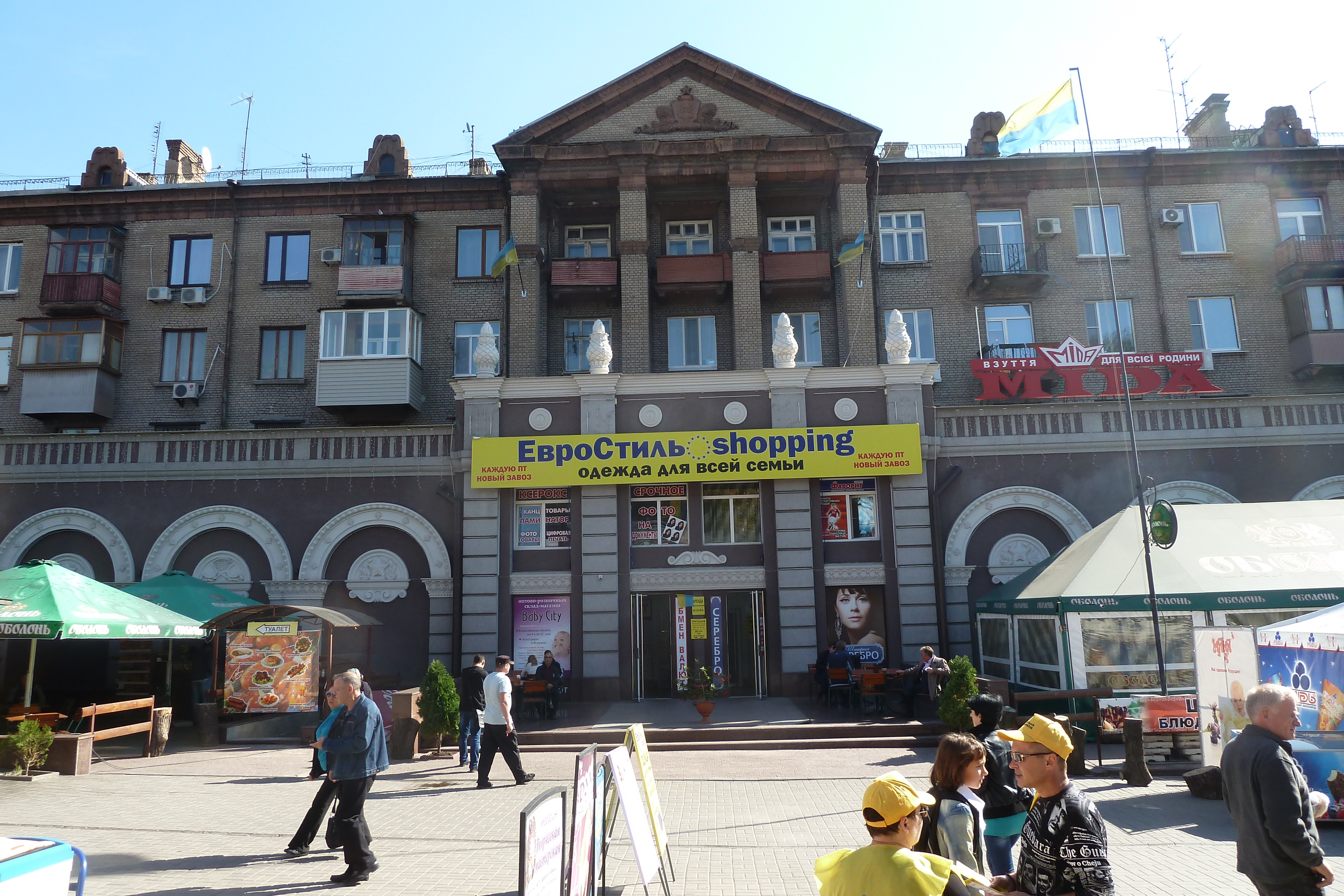 Житловий комплекс з вбудованим кінотеатром, Запоріжжя, просп. Леніна, вул. Анголенко, вул. Горького